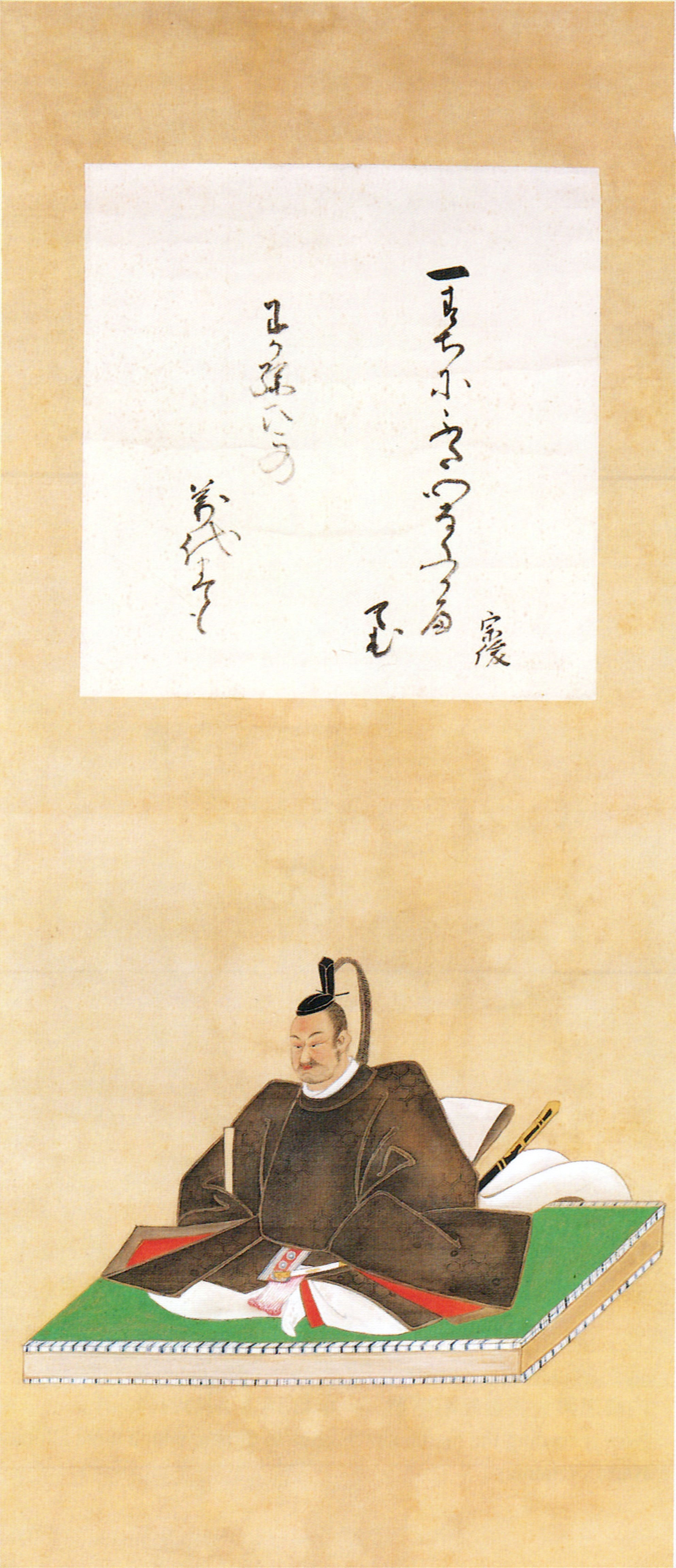 青山宗俊の肖像。